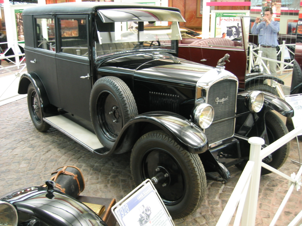 Peugeot Type 177 - Musée Peugeot Sochaux